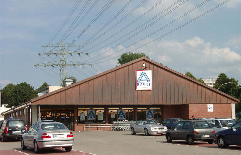 Ein Aldi-Markt in Hamburg. GNU-FDL, selbst fotografiert.